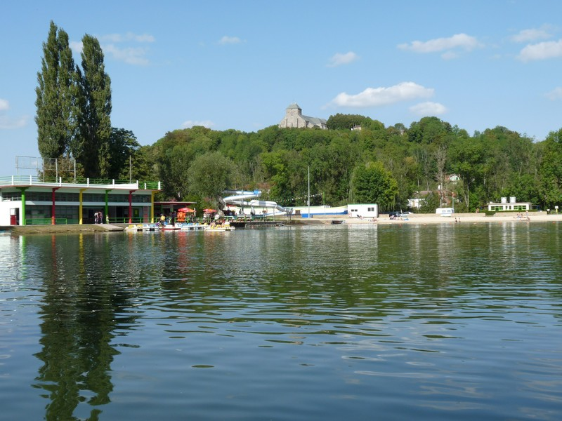 Base de Loisirs du Lac Vert Plage - Ancienne citadelle de Dun-sur-Meuse à l'arrière-plan